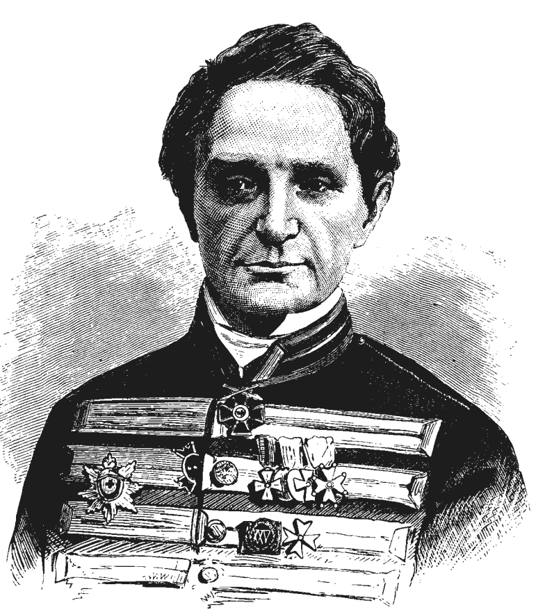 Львов, Алексей Фёдорович